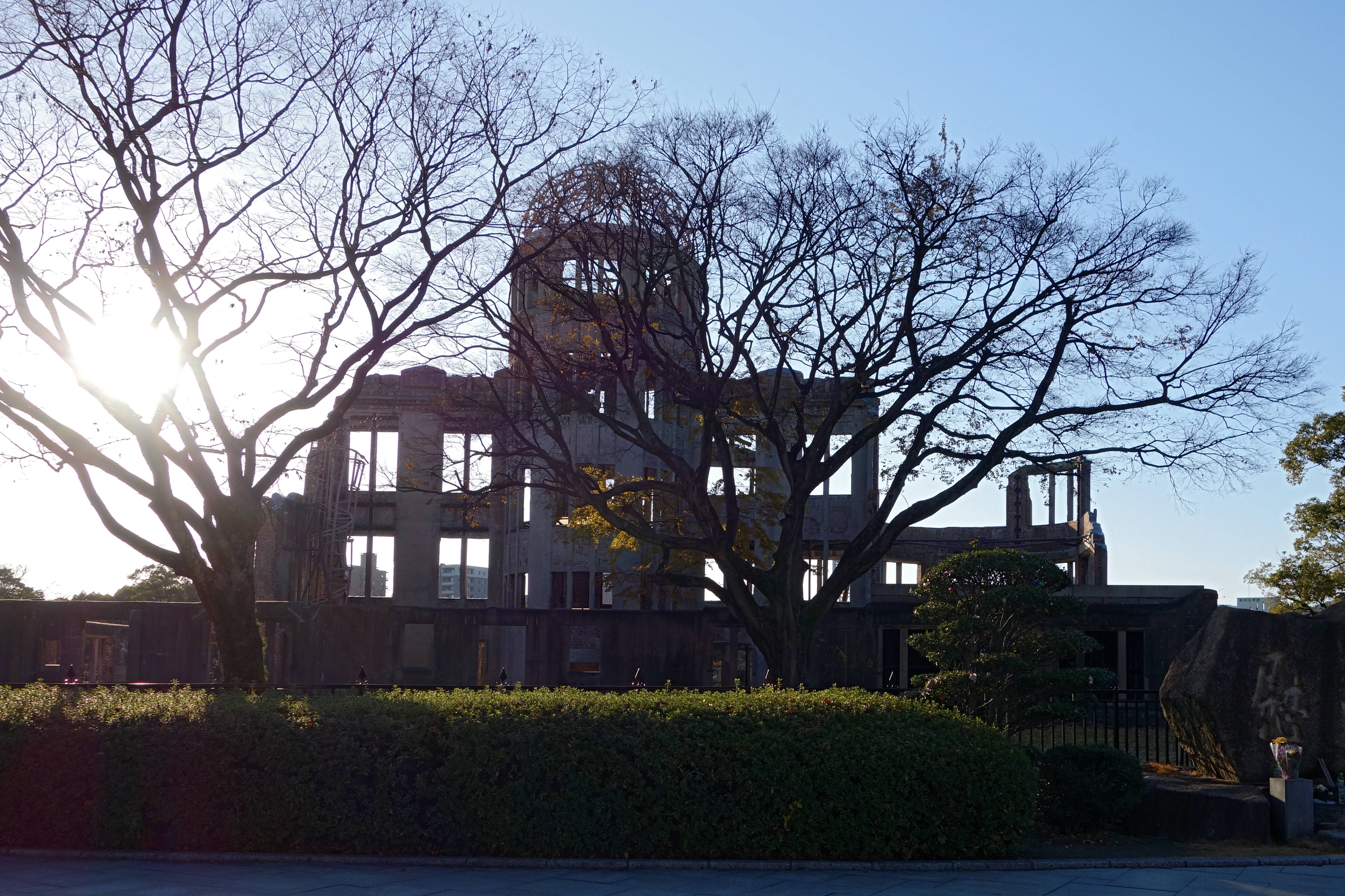 Genbaku Dome (原爆ドーム), Hiroshima, Hiroshima prefecture, Japan